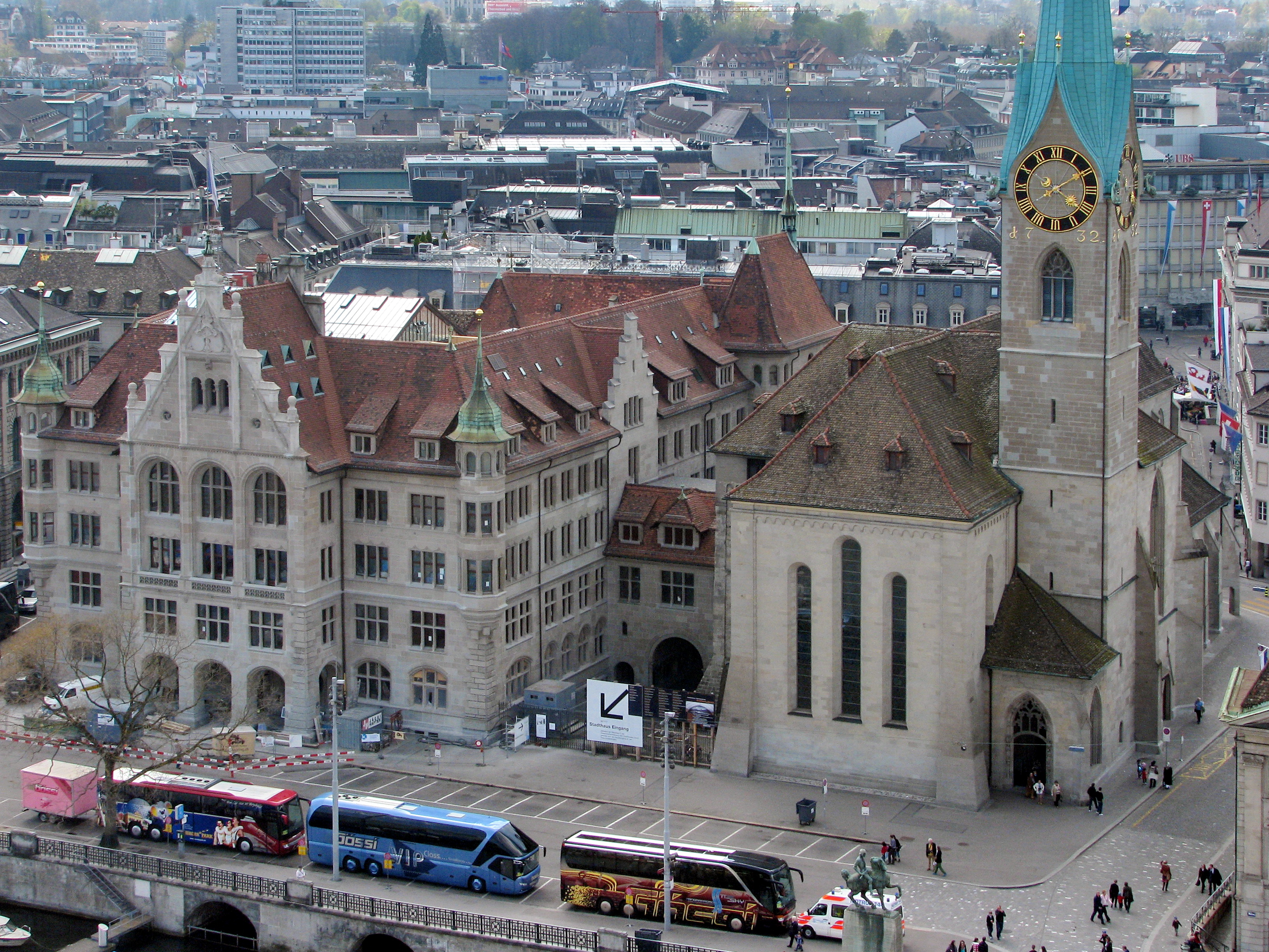 Stadthaus and Fraumünster in Zürich (Switzerland) as seen from Grossmünster's Karlsturm